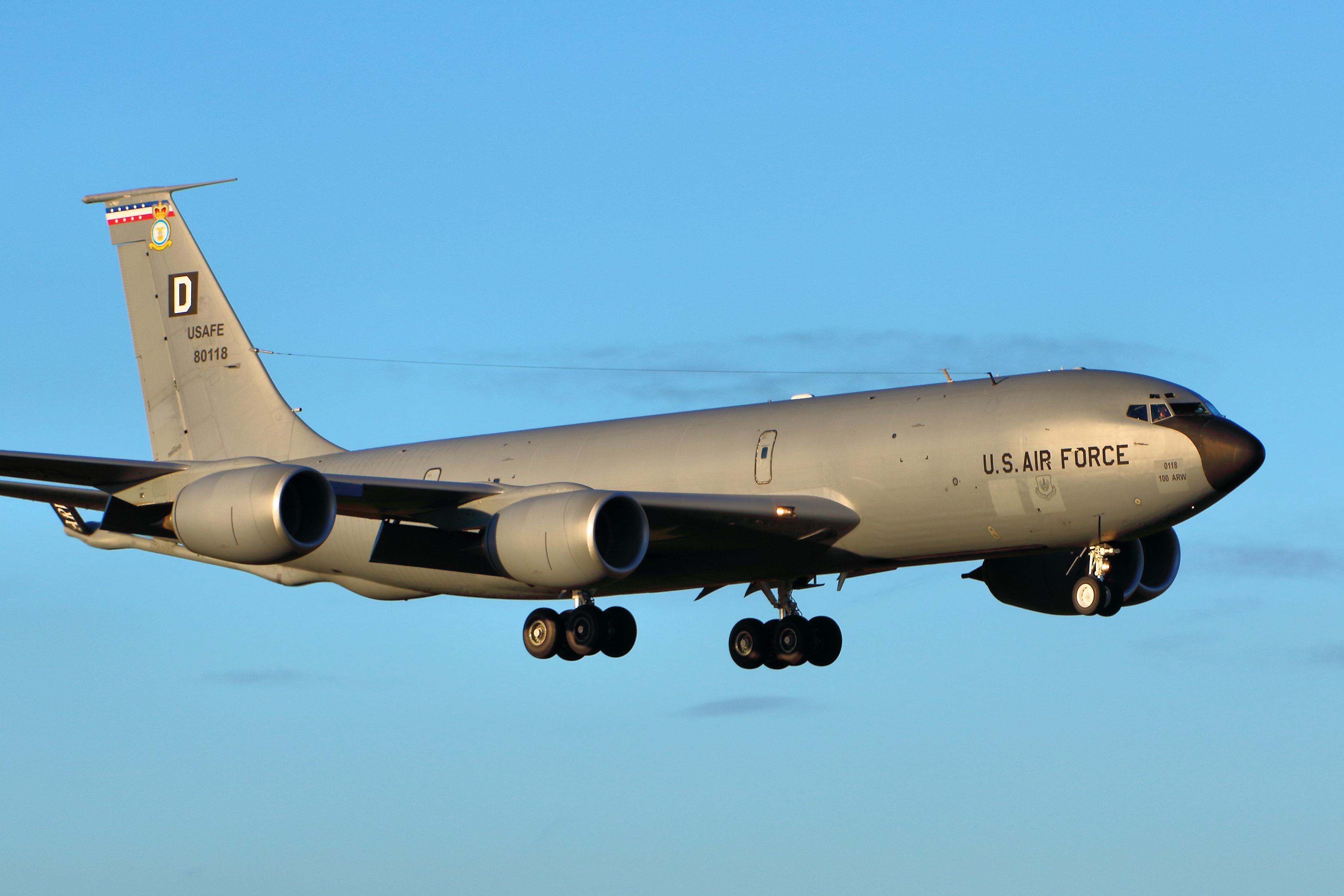 KC-135 - RAF Mildenhall